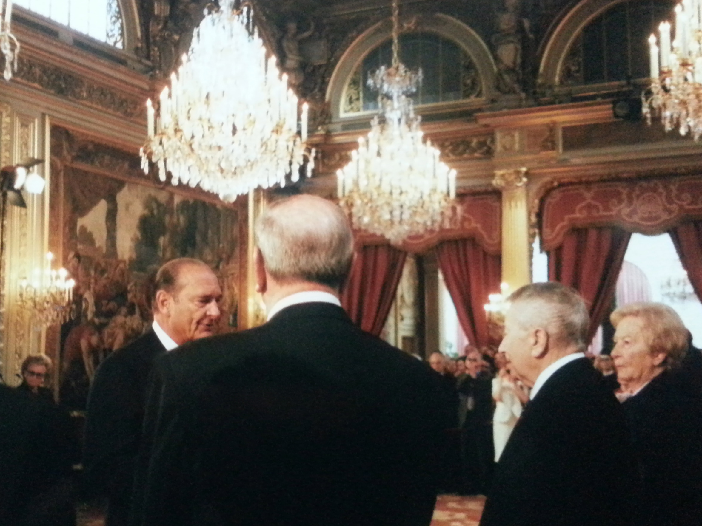 Gabriel Kaspéreit décoré de la Légion d'Honneur par Jacques Chirac en 2003